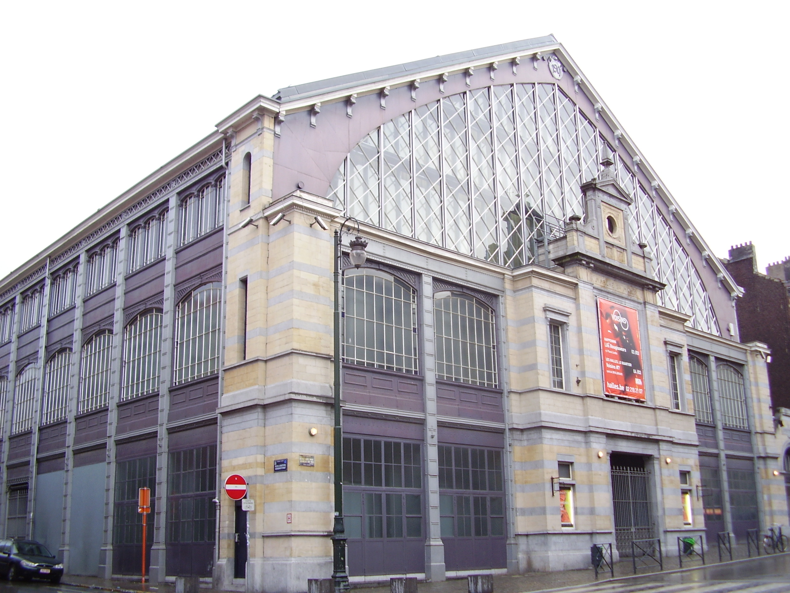 Halles de Schaerbeek, Bruxelles – Centre culturel, ancien marché Sainte Marie 1901